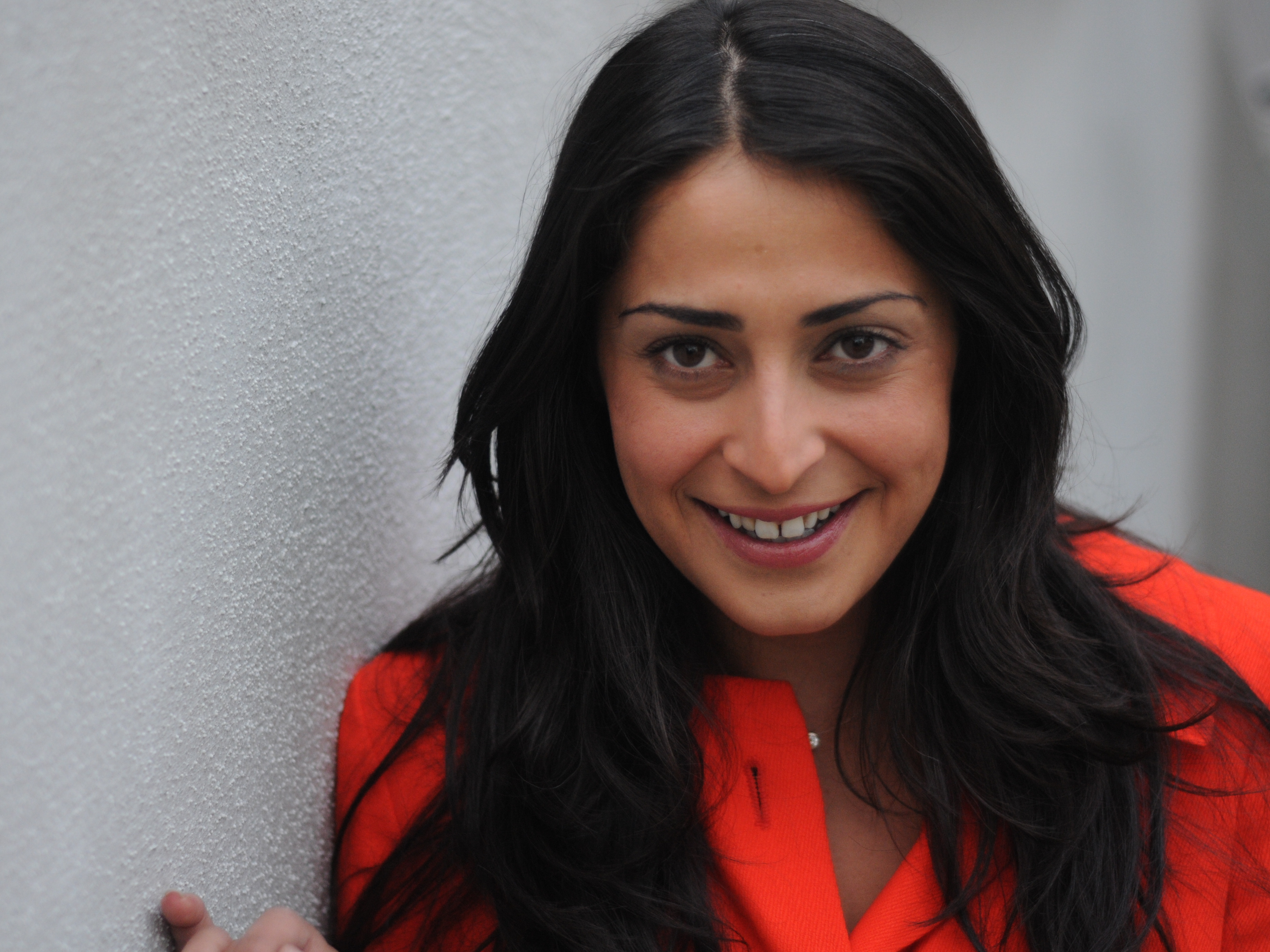 photo d'Özlem, jeune femme politique belge